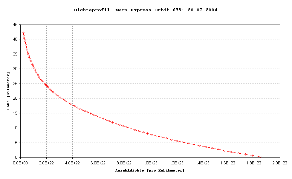 Dichteprofil